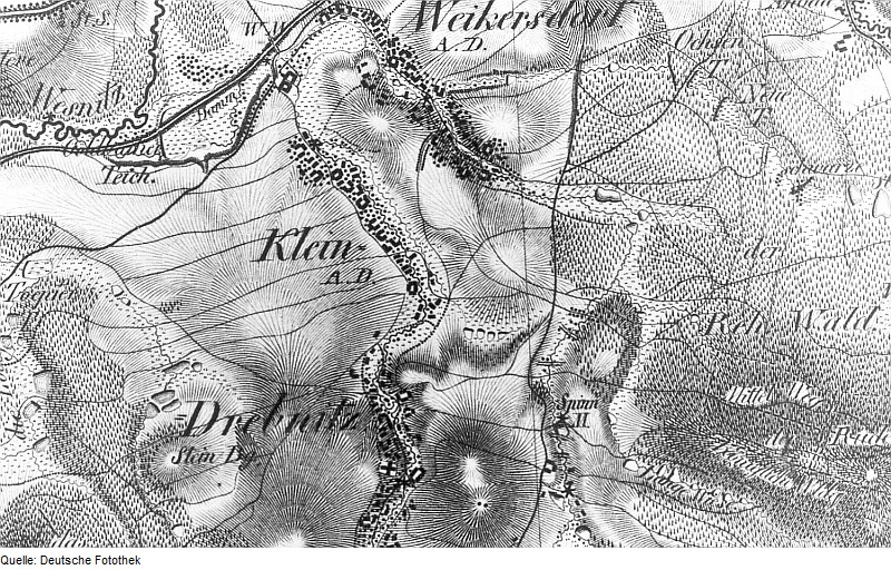 Original image description from the Deutsche Fotothek Bischofswerda-Kleindrebnitz. Oberreit, Sect. Stolpen, 1821/22